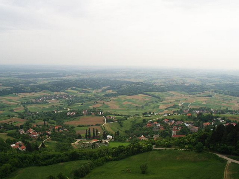 Kalnik - View on the village 2